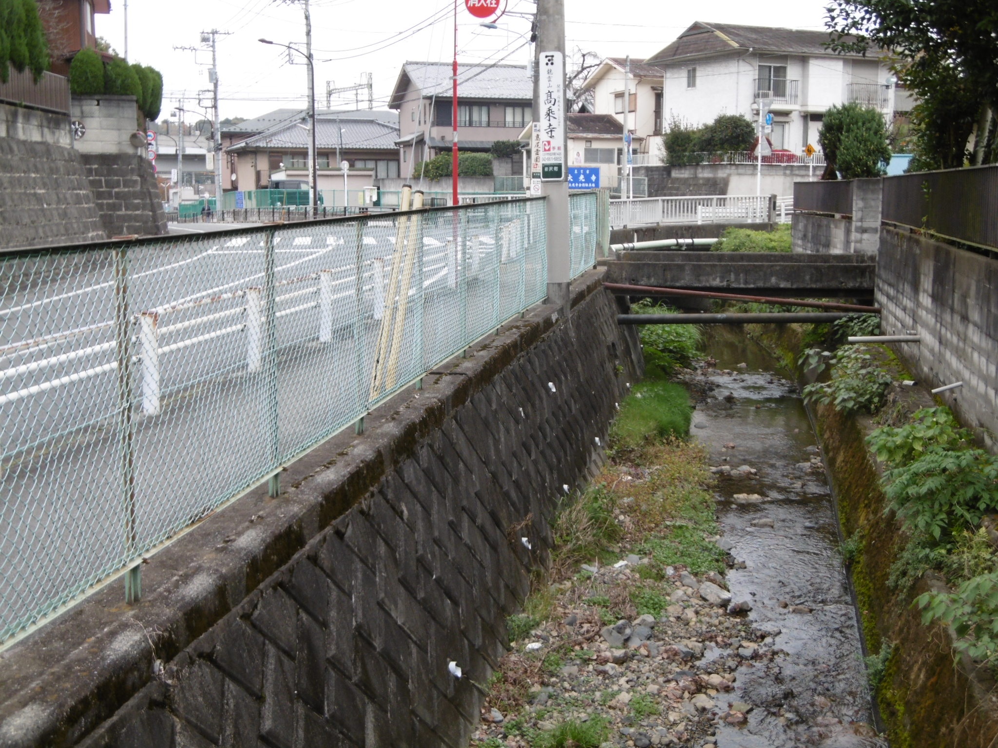 東京都八王子市の高尾駅付近に流れる初沢川。奥のＪＲ中央本線や京王高尾線(高架線)の高尾駅の方へ流れてゆく。